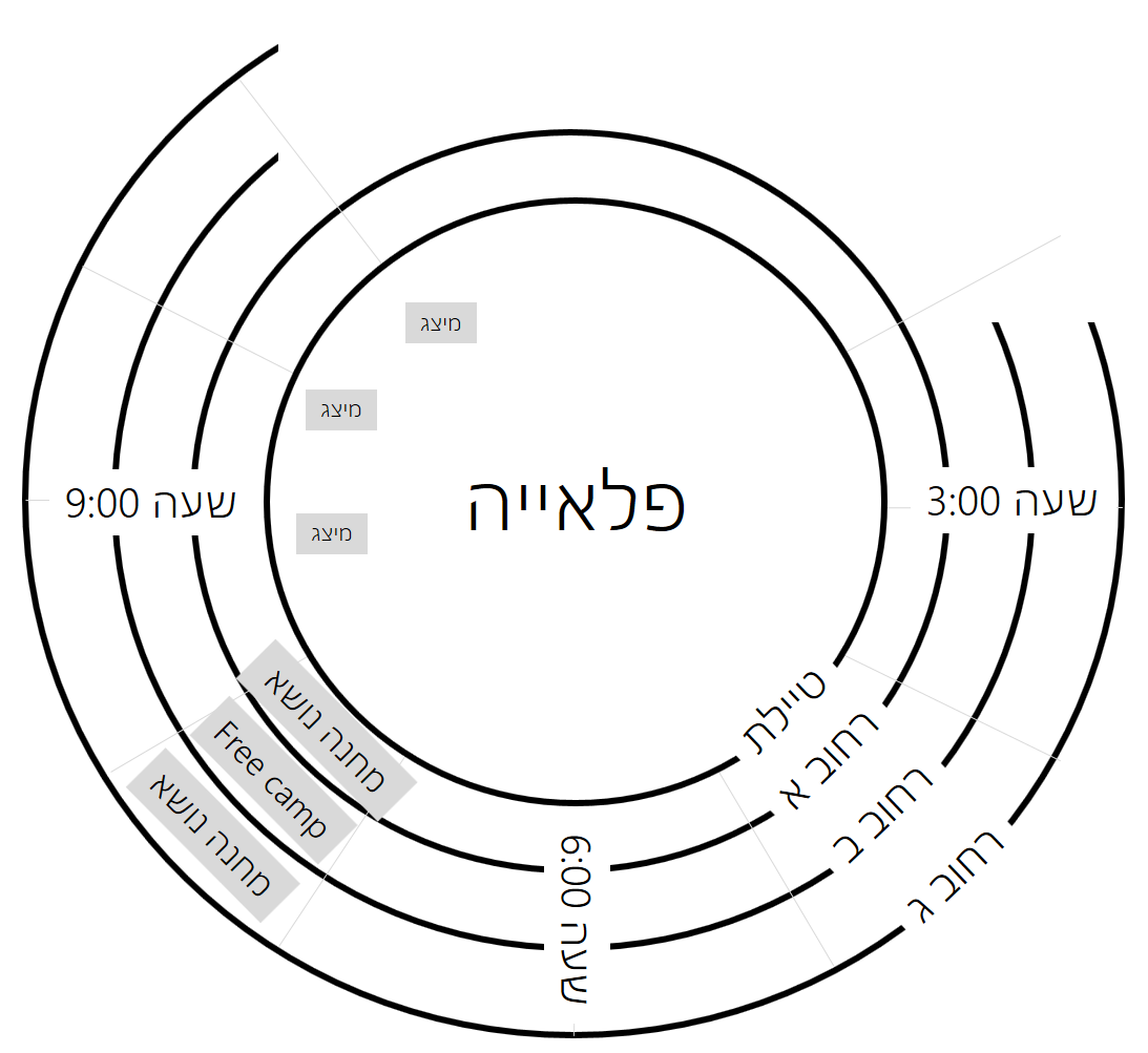 מבנה העיר, הרחובות ופריסת המחנות בשעות השונות